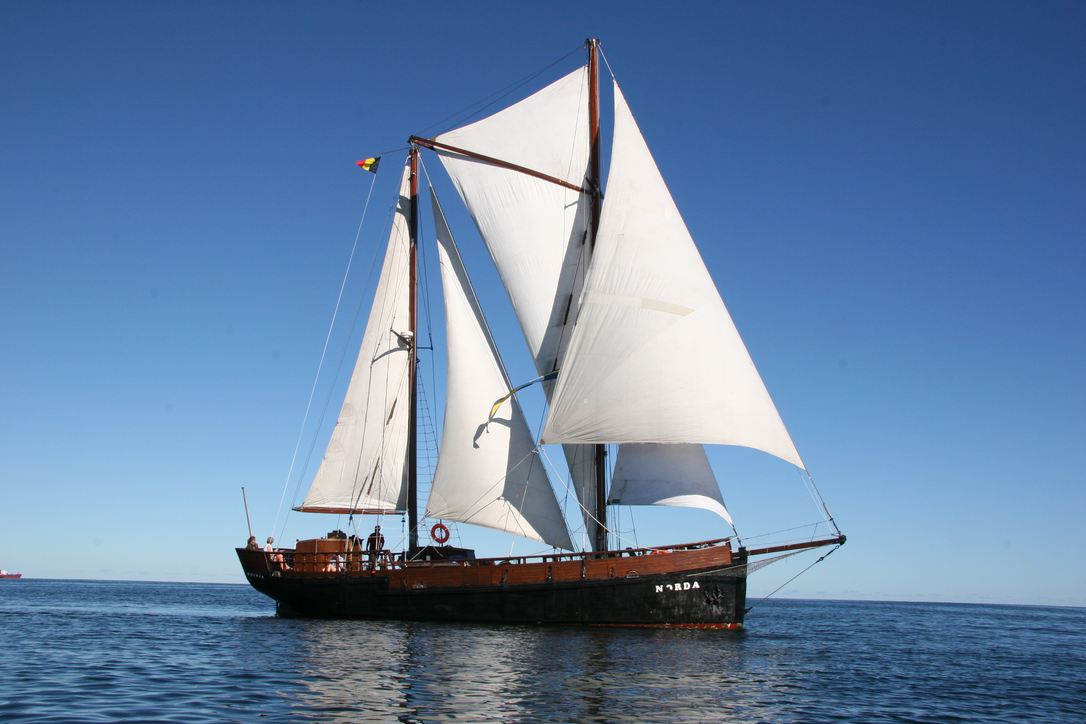 S/Y Norda